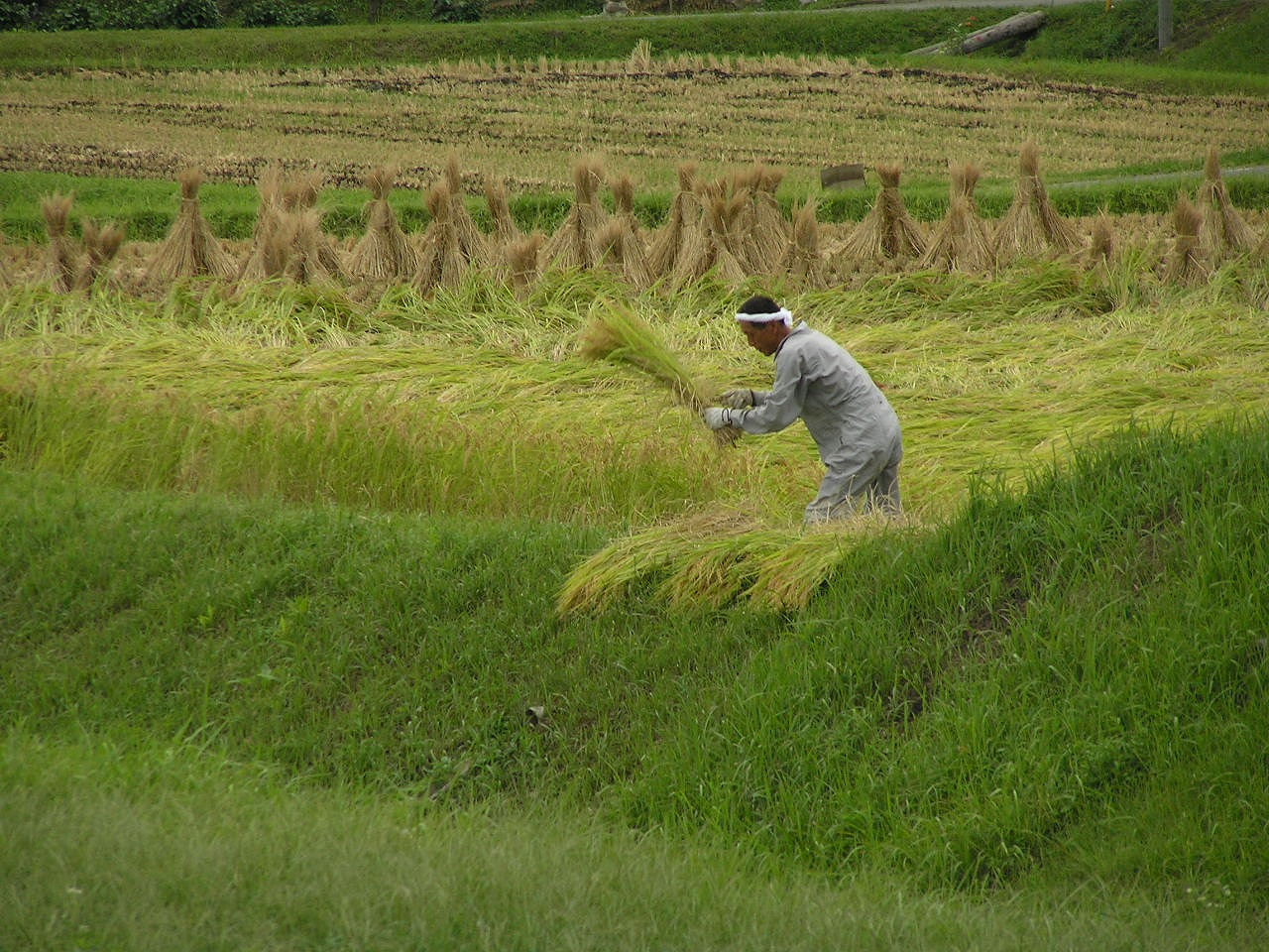 kari-ire刈入れ 丹波地方